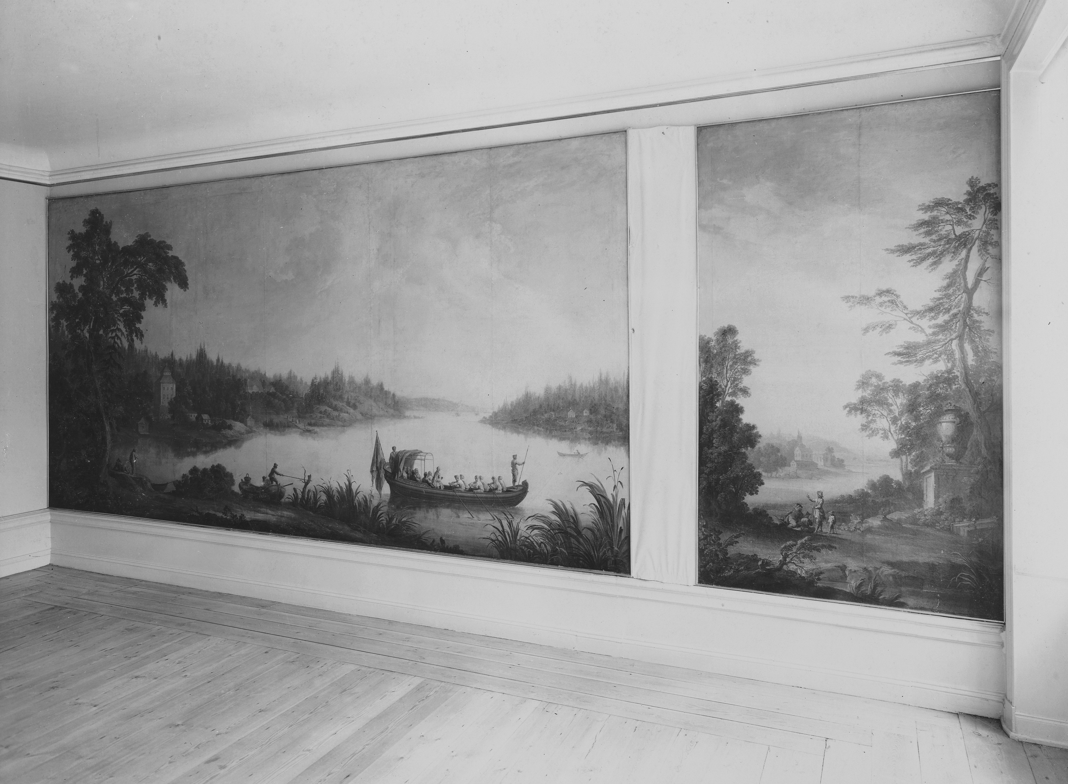 Huset i fastigheten Trivia 2 (Järntorget 83) kallas Roland Schröders hus. Det byggdes 1752 på initiativ av Schröder (eller Skröder) under ledning av arkitekten Jean Eric Rehn. Från denna tid finns vissa delar av den förnämliga rumsinredningen och väggmålningar bevarade.